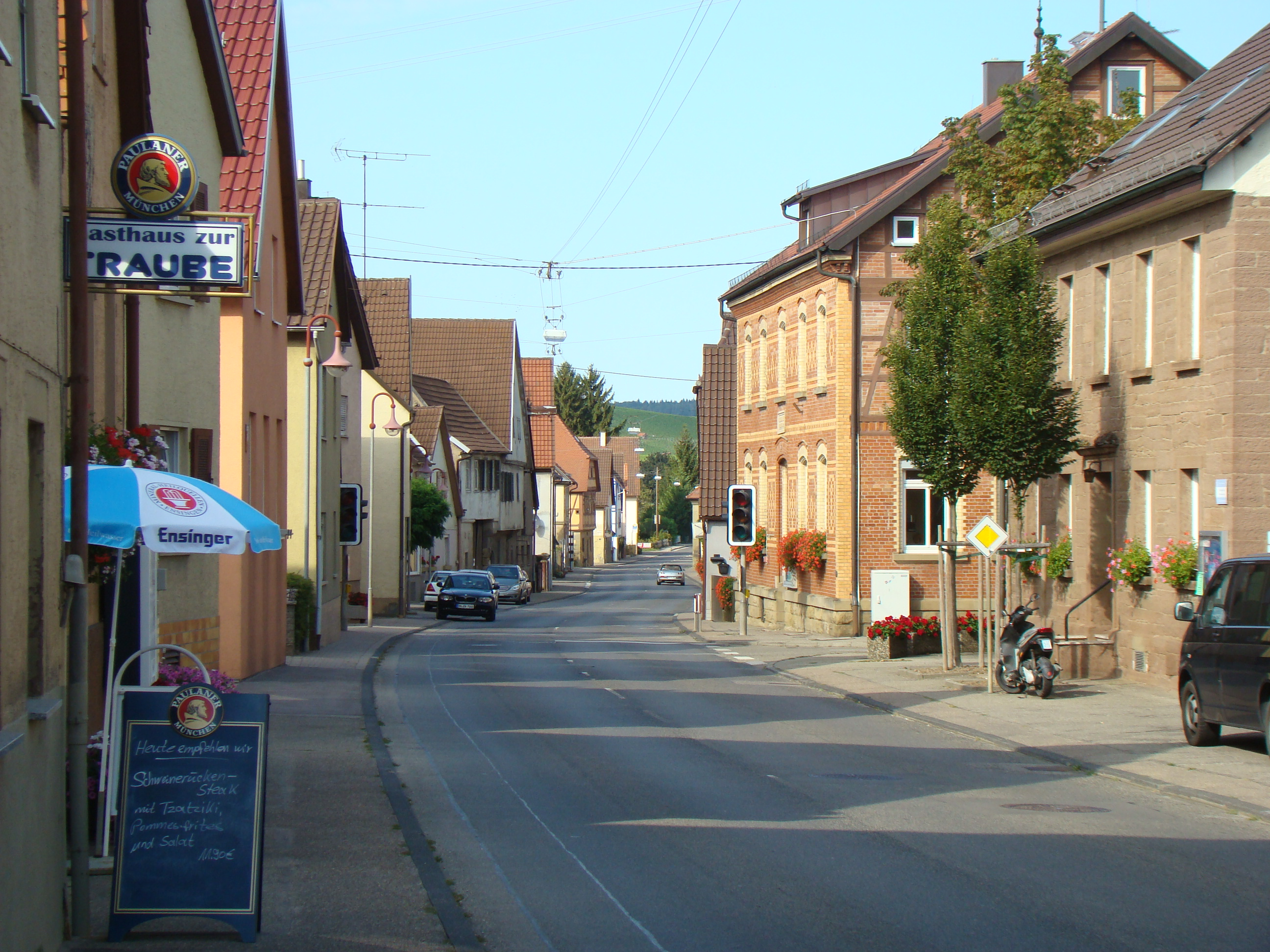 Brackenheim-Dürrenzimmern, Ortsdurchfahrt. Rechts bei der Ampel das alte Schulhaus von 1992, links in der Bildmitte bei den Autos der Klosterhof, weiter hinten das alte Rathaus von 1732.